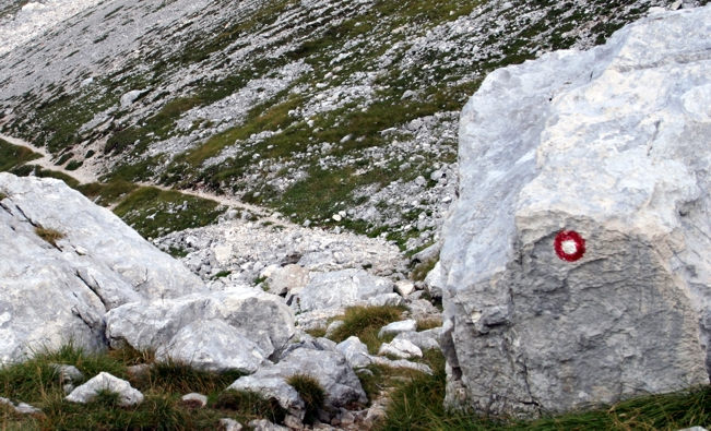 Lastno delo; planinska pot s Knafelčevo markacijo; dolina Triglavskih jezer, nad Velikim jezerom